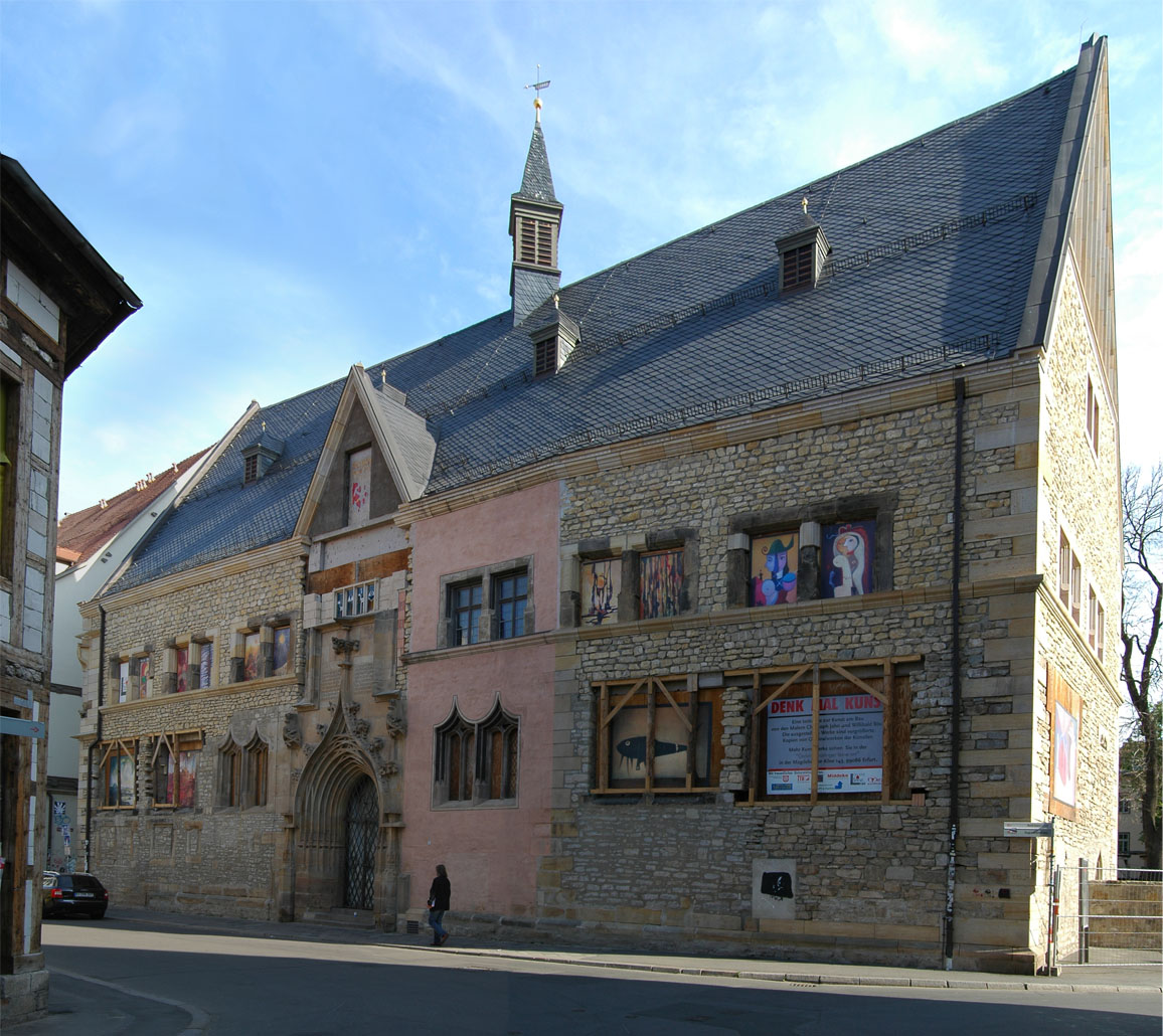 Collegium maius (Hauptgebäude der alten 1392 gegründeten Universität), in der Michaelisstraße in Erfurt